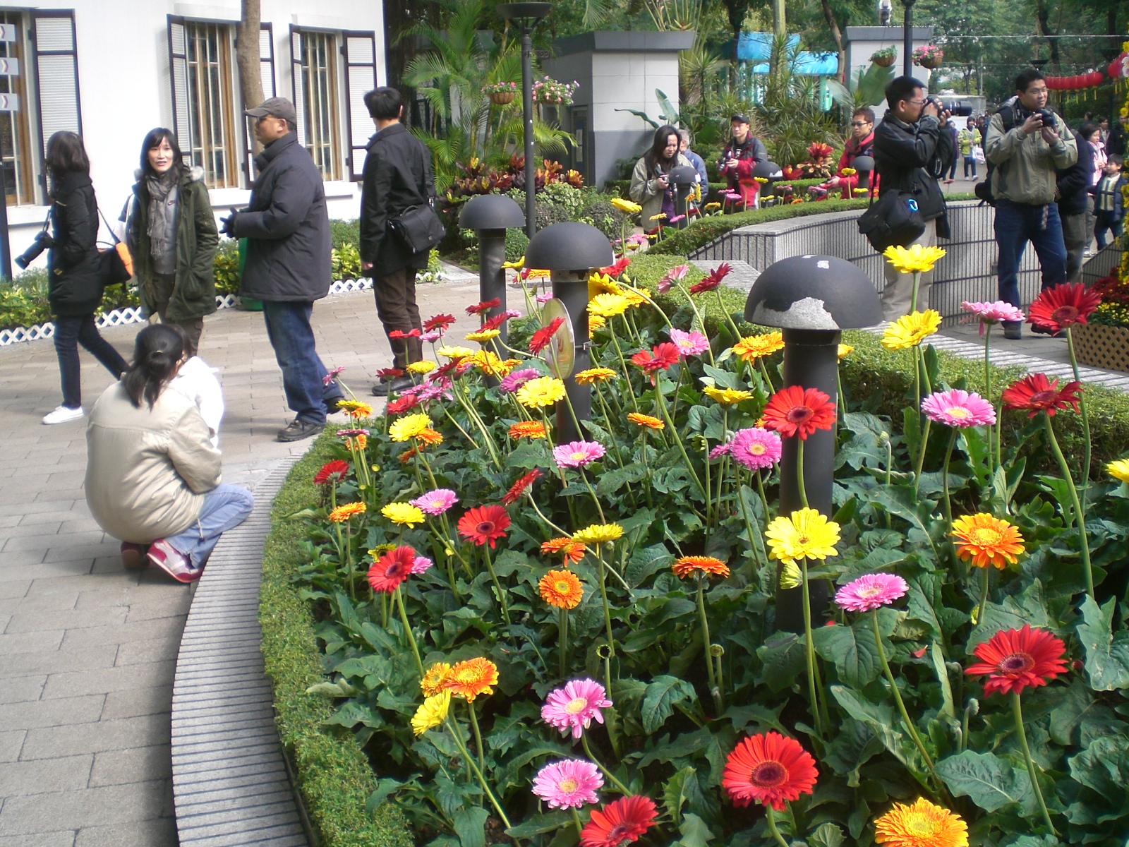 2008年2月香港公園的春天